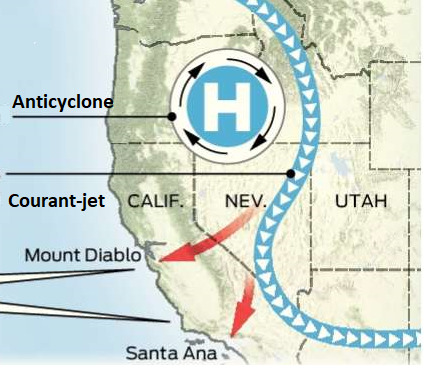 Position de l'anticyclone dans les déserts à l'intérieur des Rocheuses américaines avec le flux descendant vers l'océan Pacifique donnant le Santa Ana au sud et le Diablo au nord de la Californie.